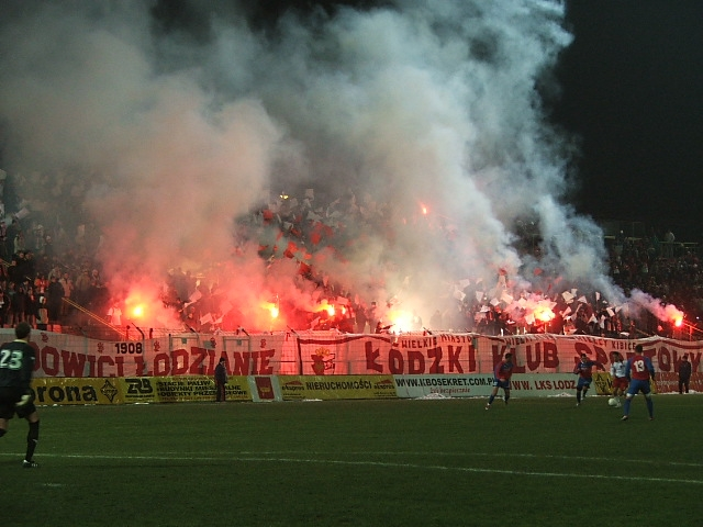 Stadion ŁKS-u Łódź podczas meczu.